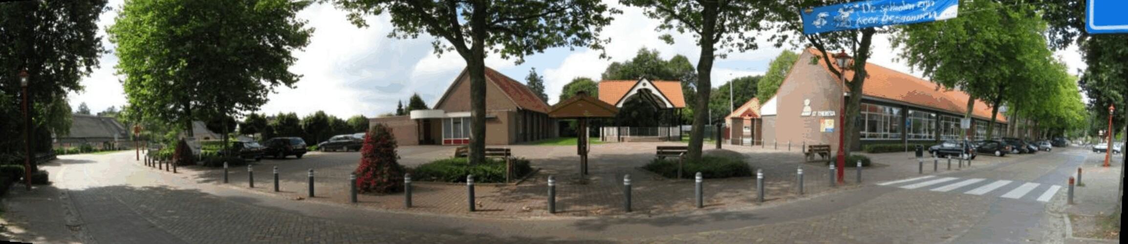 Centrum_Lennisheuvel